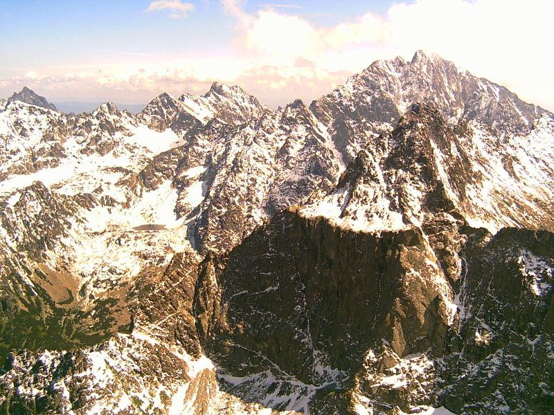 Galeria Gankowa